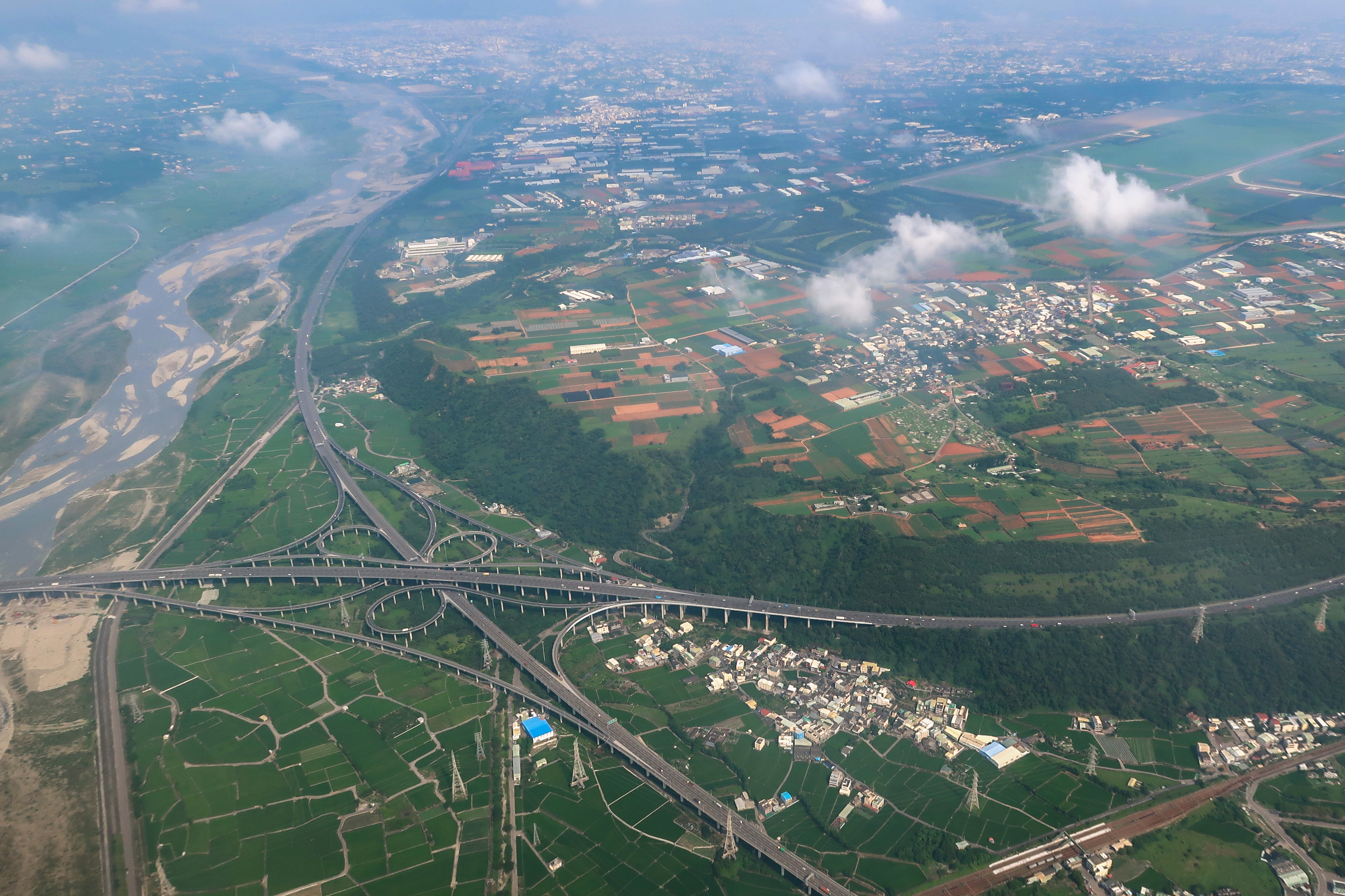 台中市清水區台中環線